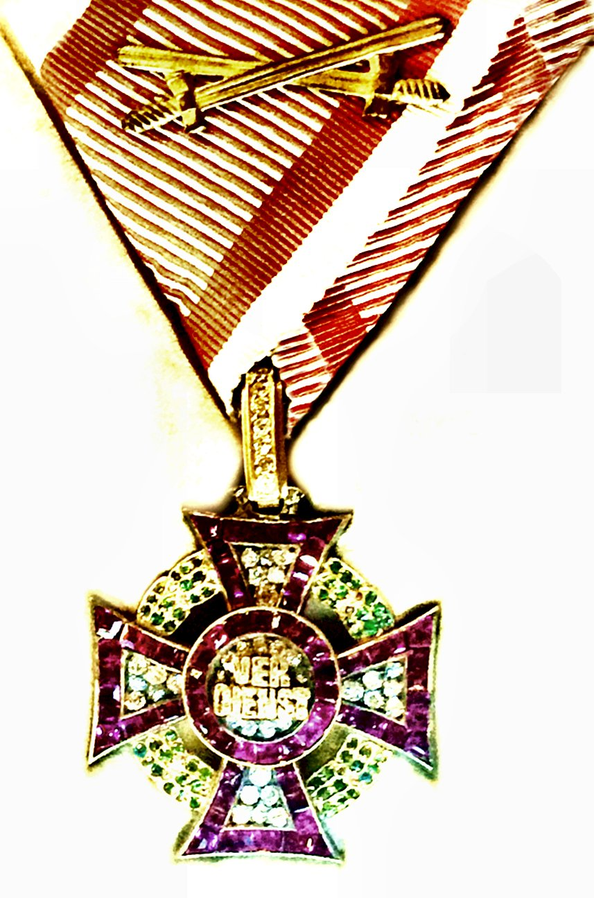 Österreichisches Militärverdienstkreuz III. Klasse mit Brillanten